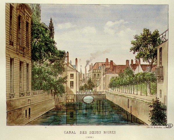 Lille : Canal des Soeurs Noiresdate : circa 1893 [1893]dimensions : 27 x 35 cm.technique : lithographie